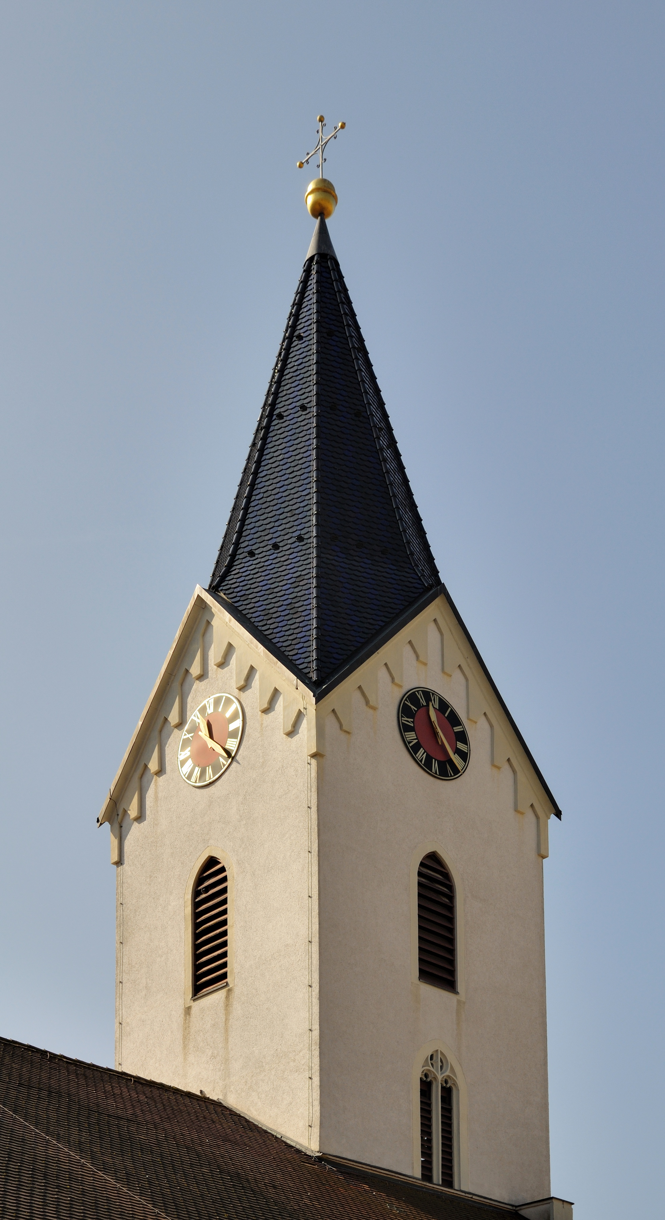 Inzlingen: Katholische Kirche, Glockenturm